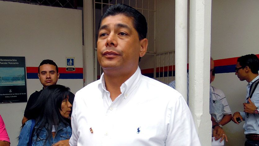 Jhon Esper Toledo